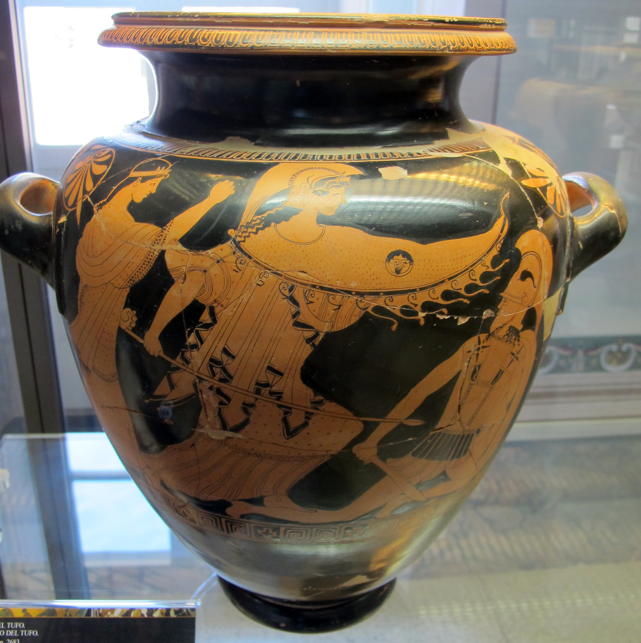 Cratere attribuito al Pittore di Altamura conservato presso il Museo Claudio Faina